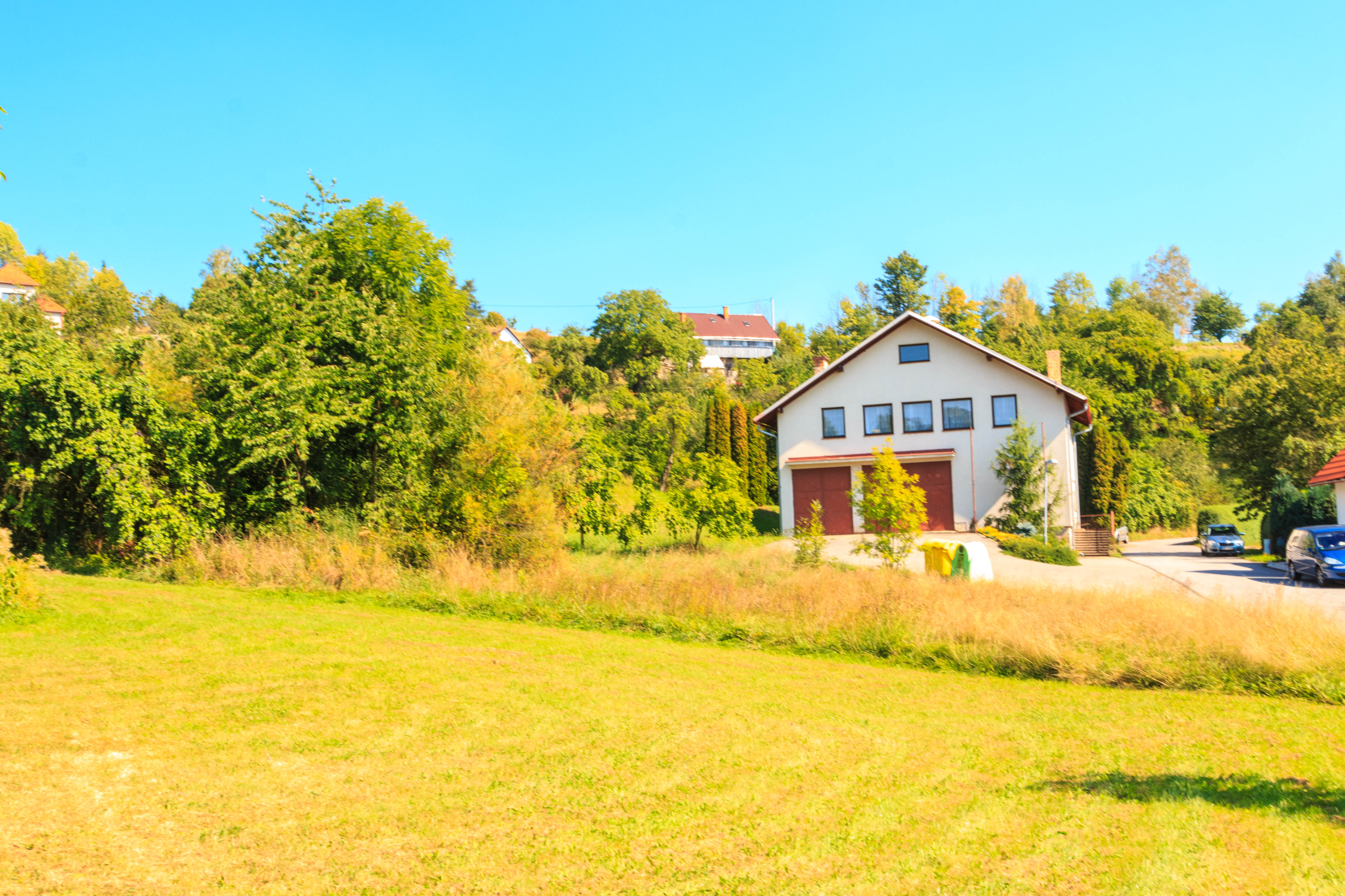 Žlábek u Tatobit - hasičská zbrojnice